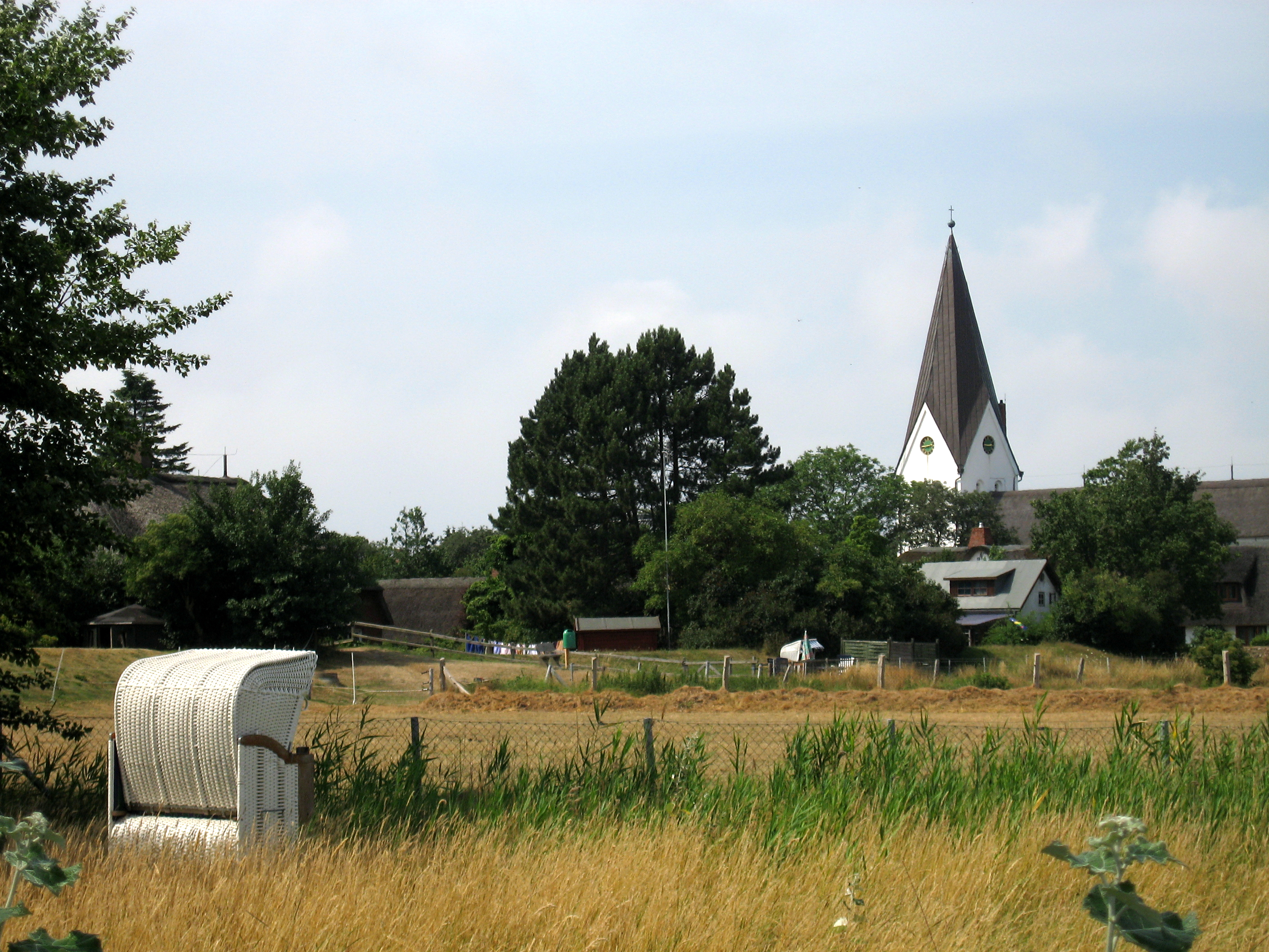 Kirche der Gemeinde Nebel auf Amrum; Wattseite des Ortes